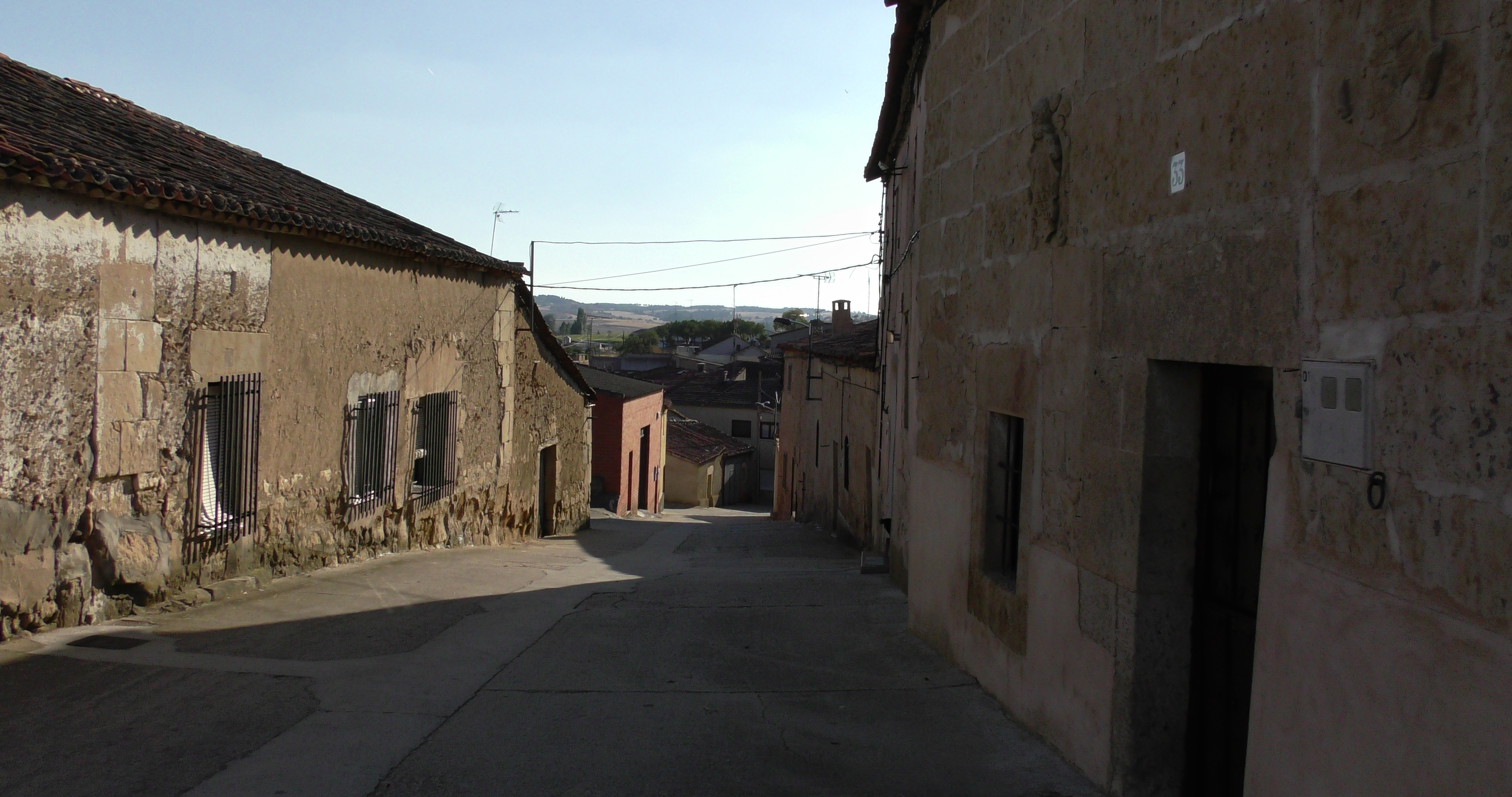 Fuentespreadas